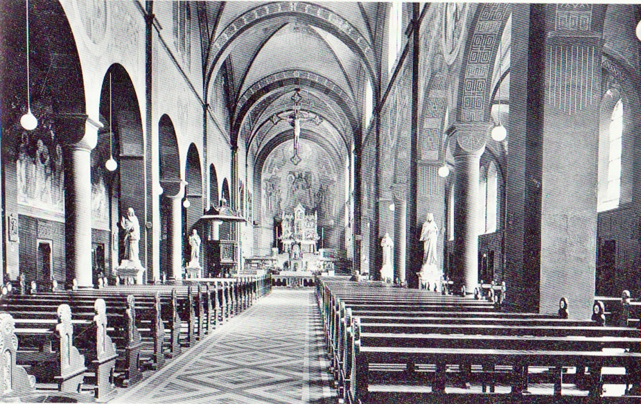 Werl Wallfahrtsbasilika, Zustand nach der Ausmalung von 1928